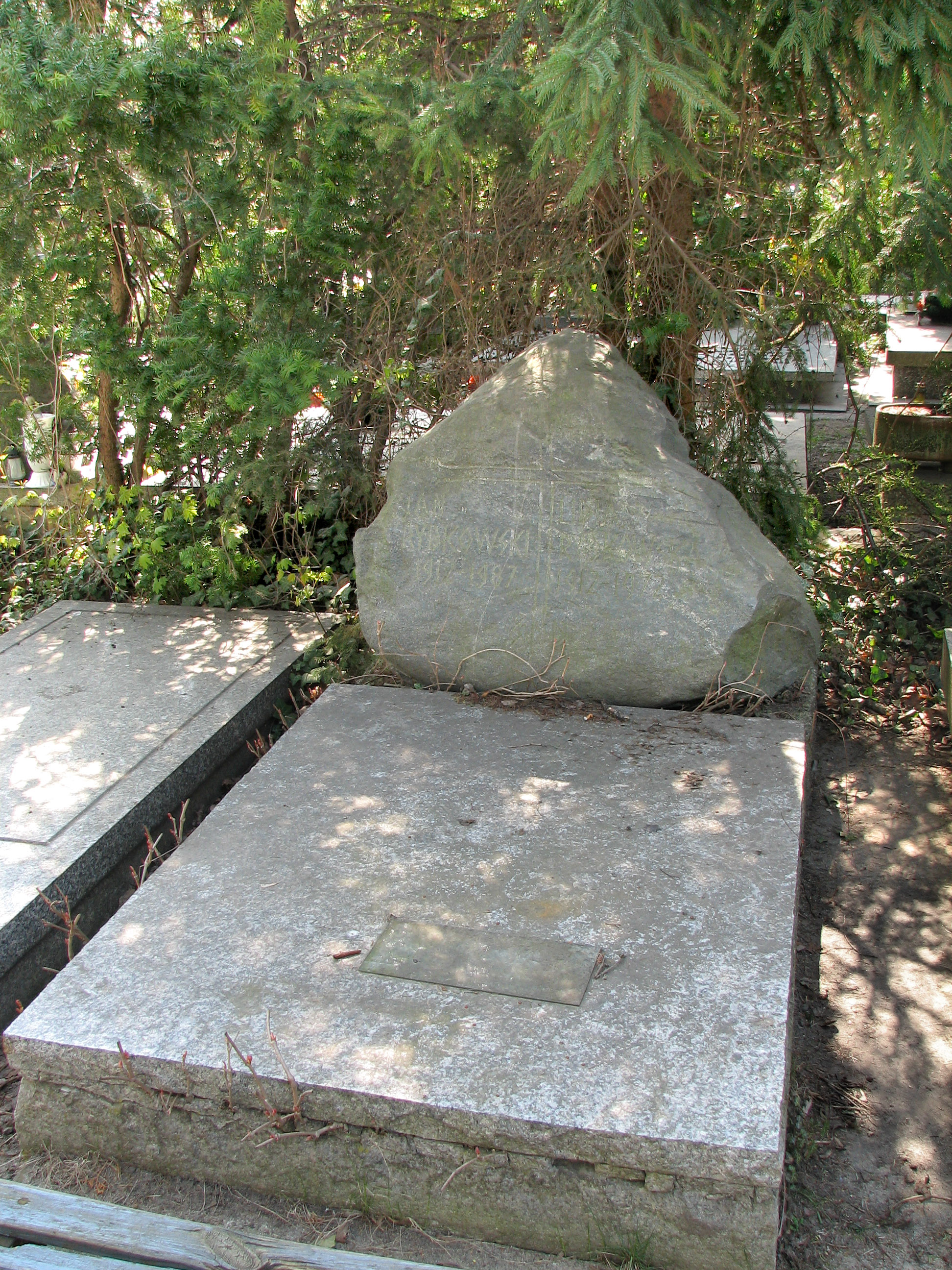 Jan Rybkowski grób - Warszawa, Cmentarz Wojskowy na Powązkach